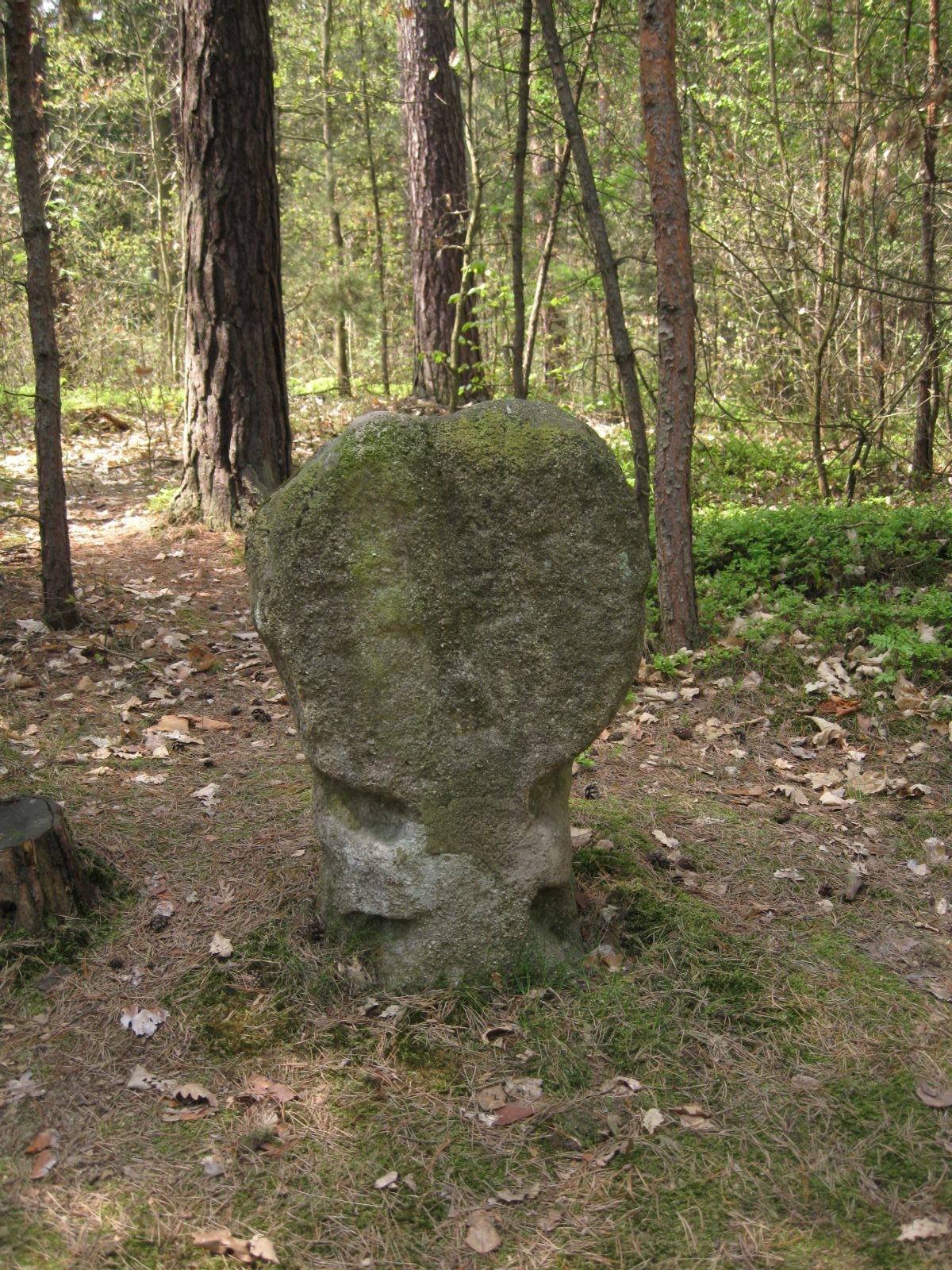 Křížový kámen na Dostálce